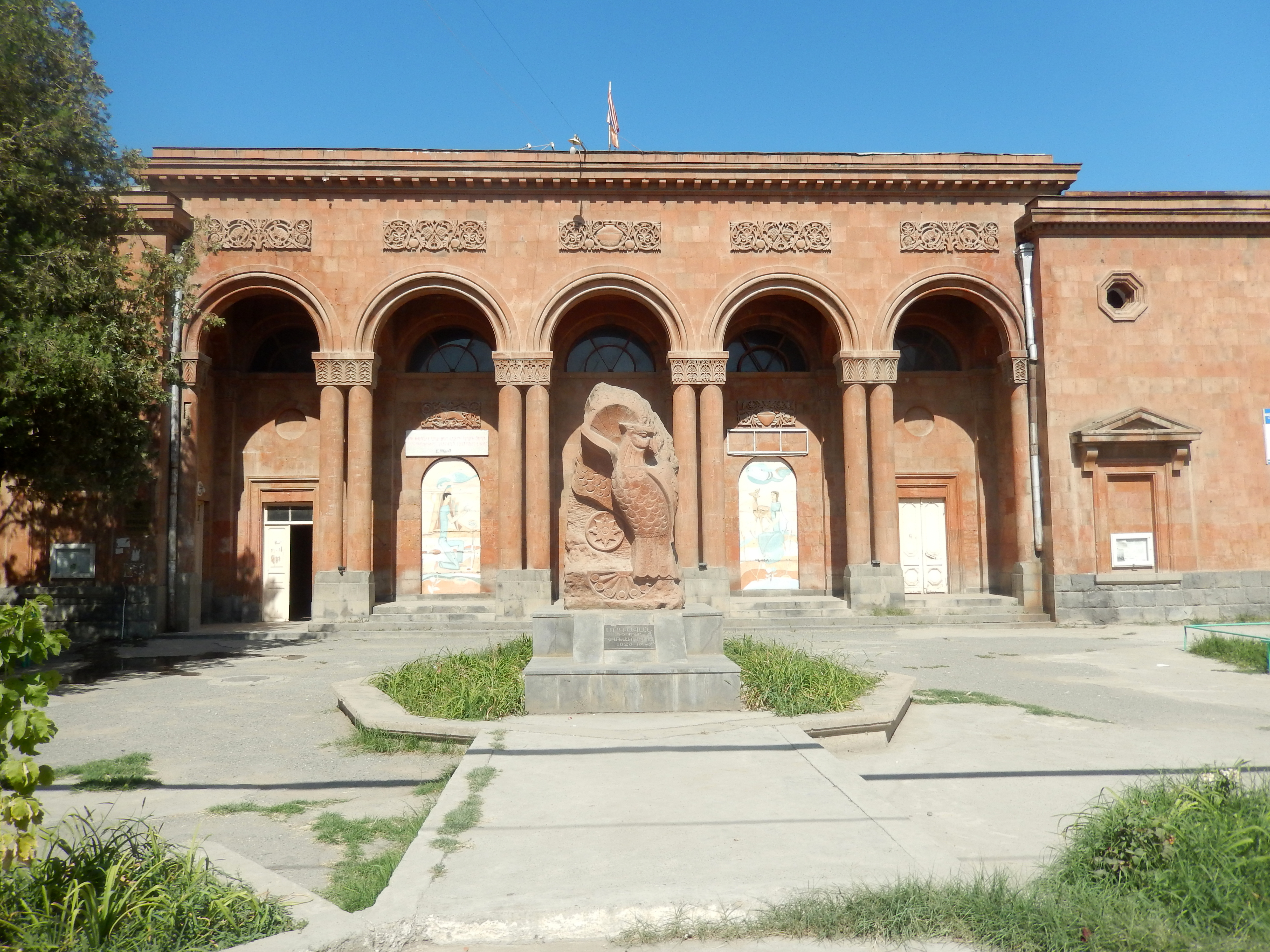 Մրգավանի գյուղապետարան 61/1